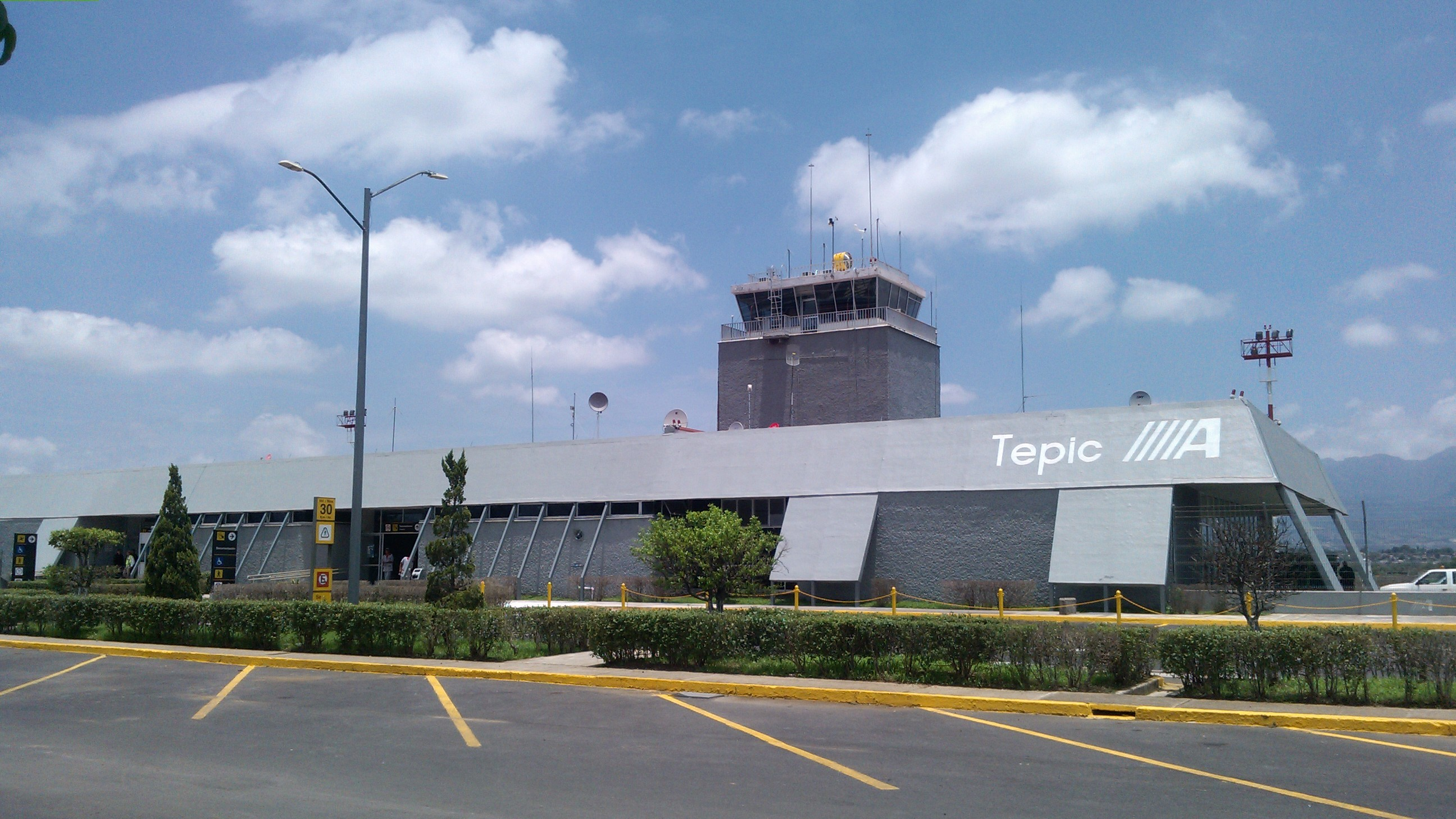 Terminal del aeropuerto internacional de Tepic